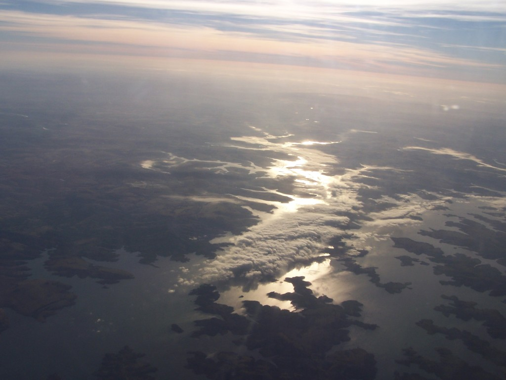 Rio Grande - MG, Brasil.